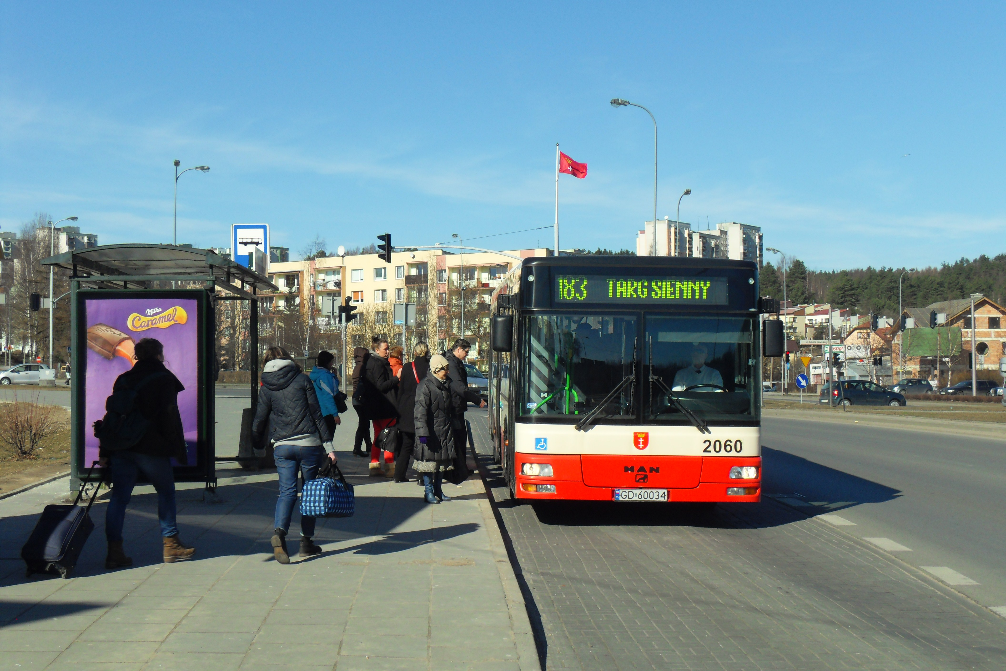 Gdańsk Brętowo, autobus 183 (#2060) na ulicy Potokowej.